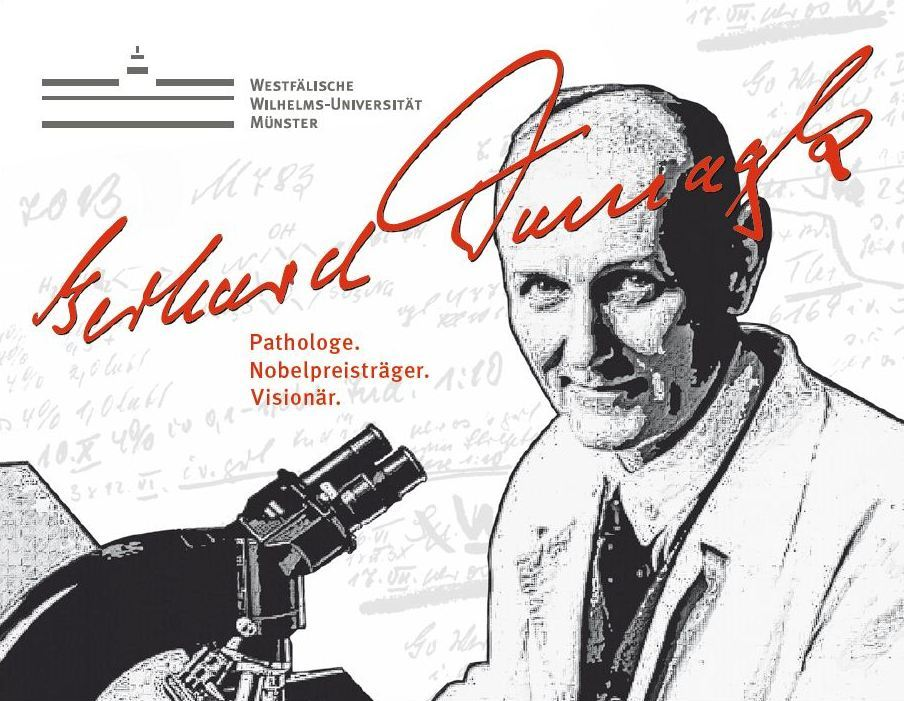 Gerhard Domagk. Die Verleihung der Nobelpreises an Gerhard Domagk, dem einzigen Nobelpreisträger der WWU, jährte sich 2014 zum 75. Mal.